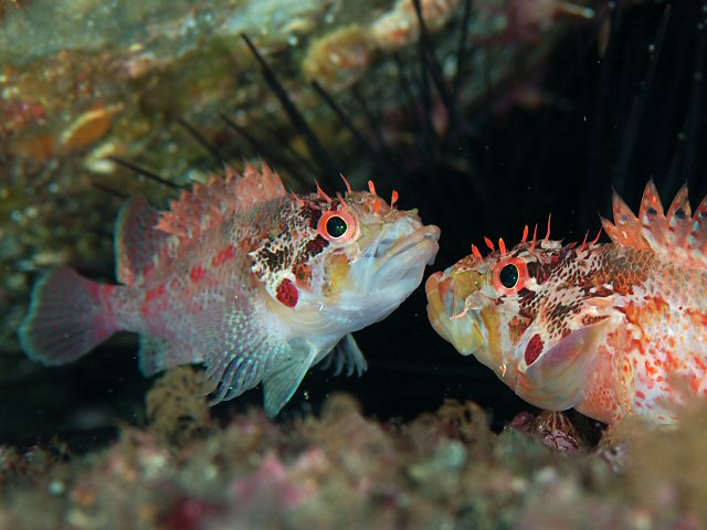 イソカサゴ Scorpaenodes littoralis